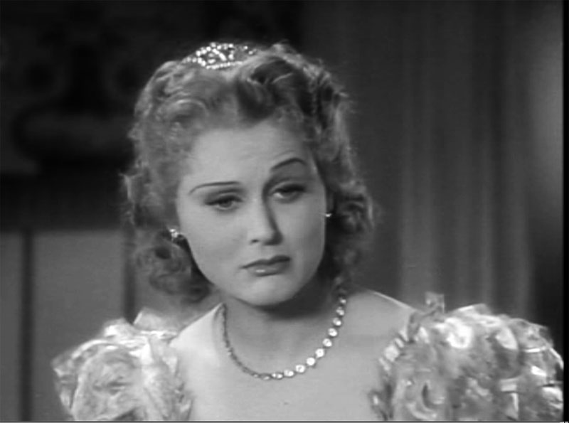 Rökk Marika a "Gasparone" című filmben